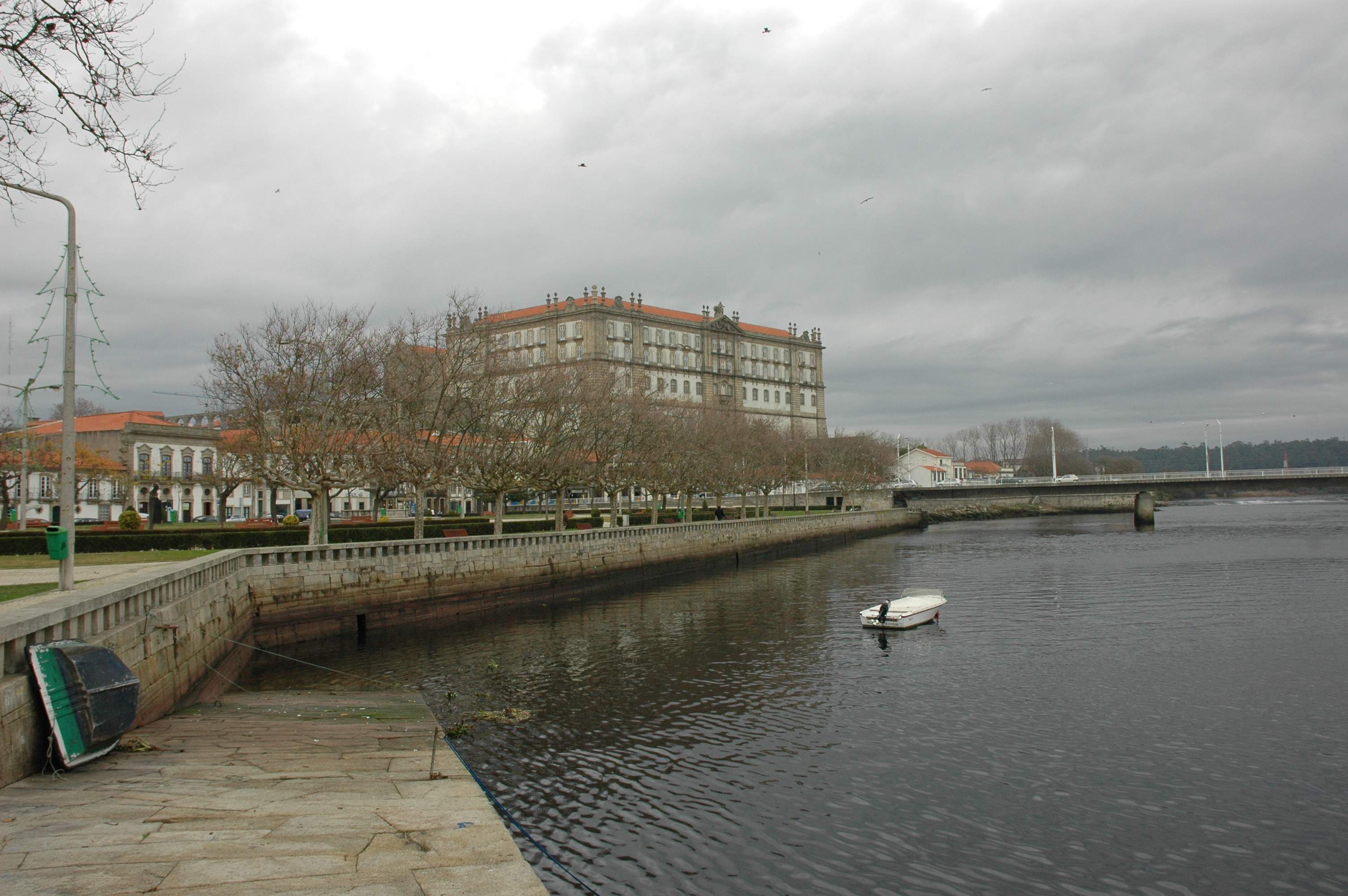 Vila do Conde - Monestir de Santa Clara sobre el riu Ave